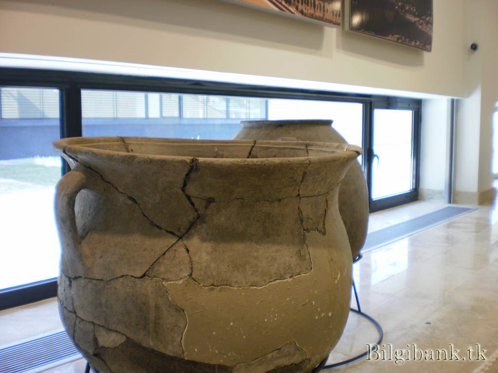 Kaman kalehöyük müze eserleri den büyük çömlek